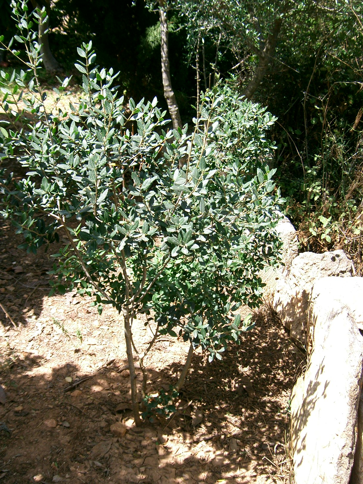 Aladern. Rhamnus alaternus. Son Carrió. Mallorca